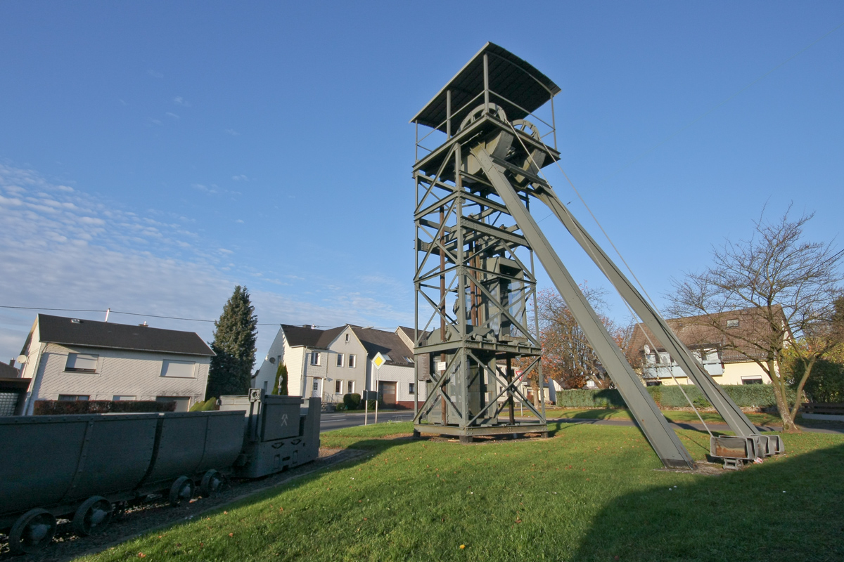 Ein Förderturm und eine Grubenbahn der 1961 stillgelegten und 1989 abgerissenen Braunkohlegrube Alexandria wurde als Industriedenkmal am Marktplatz von Höhn (Westerwald) erhalten.